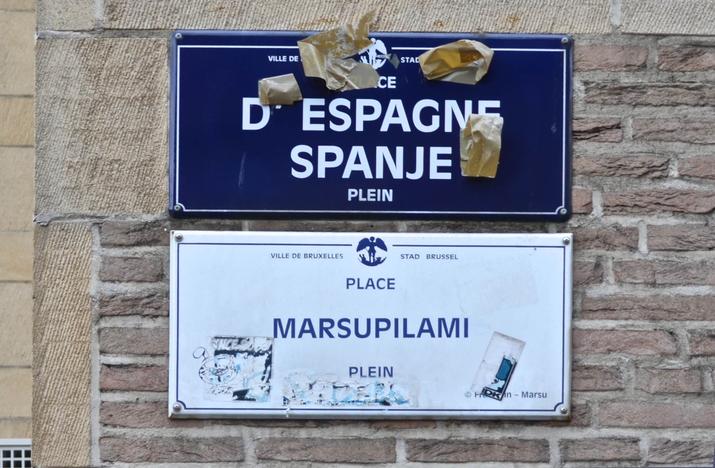 Bruxelles, plaque place d'Espagne-Spanje plein / place Marsupilami-Marsupilami plein